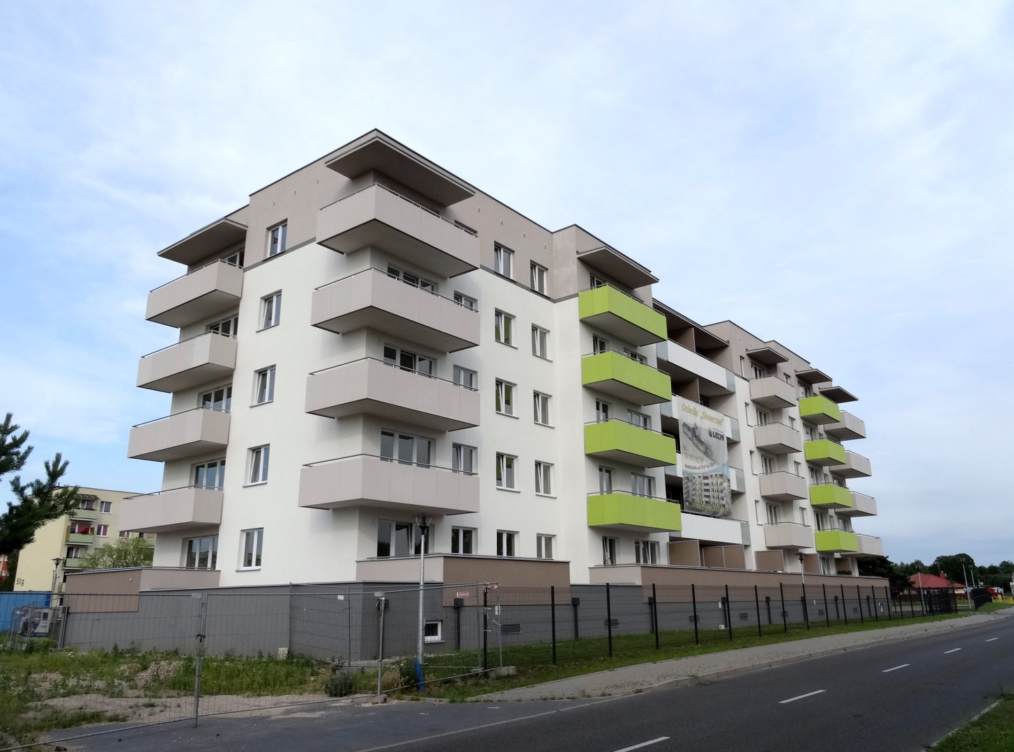 Osiedle Toruńskie w Solcu Kujawskim